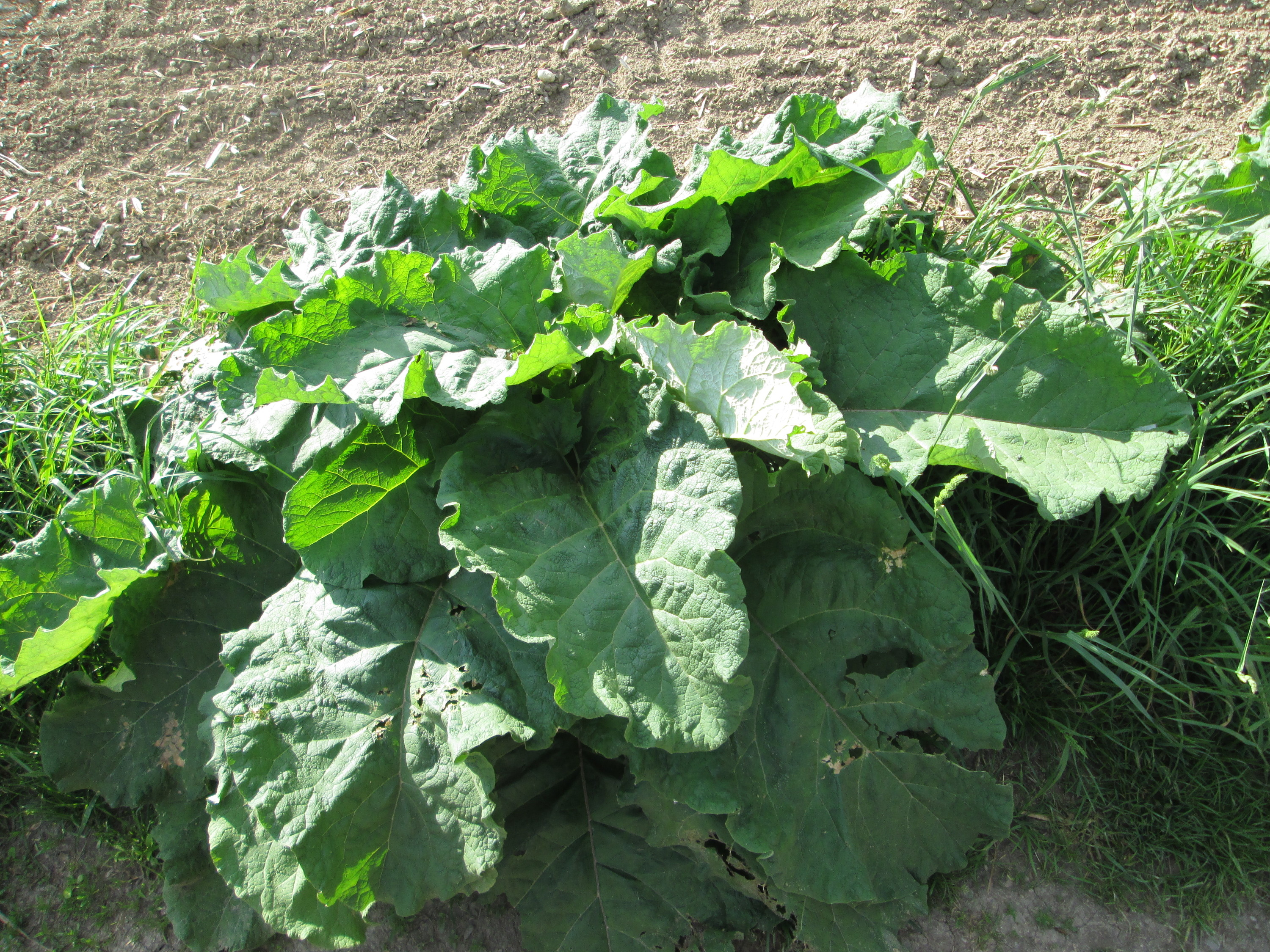 Grundblätter der Großen Klette (Arctium lappa) im Naturschutzgebiet „Bachwiesen/Leopoldswiesen“ im Hockenheimer Rheinbogen